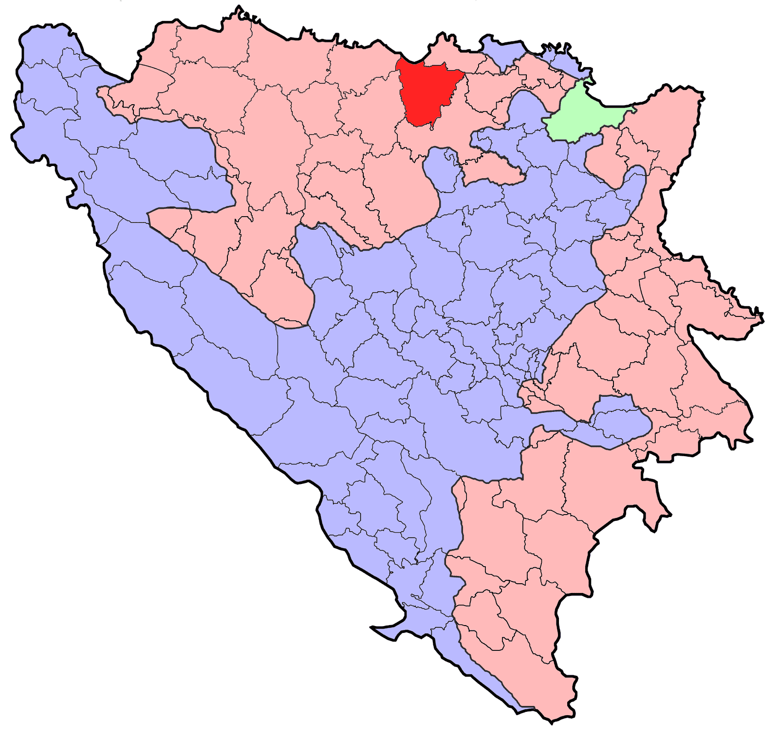 Republika Srpska (BiH) municipality